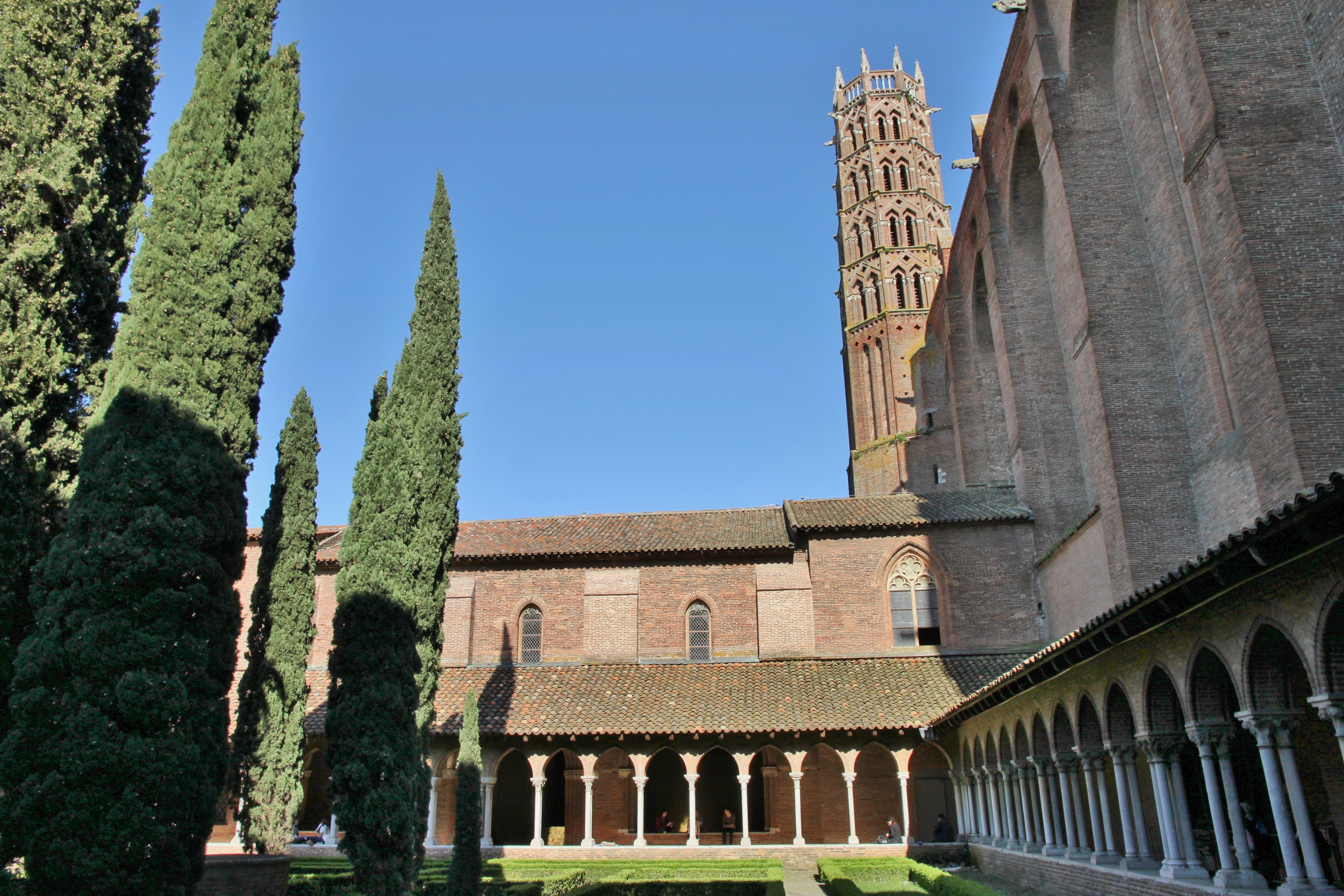 Le couvent des Jacobins à Toulouse